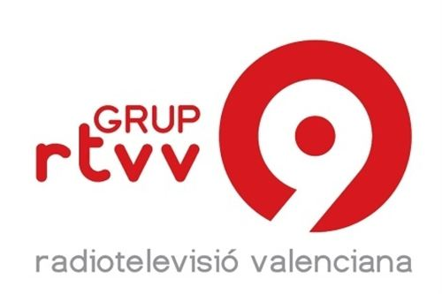 Imagen corporativa del Grupo Radiotelevisión Valenciana